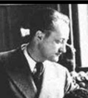 Hans von Halban (* 24. Januar 1908 in Leipzig; † 28. November 1964 in Paris) Montreal, Manhattan-Projekt.